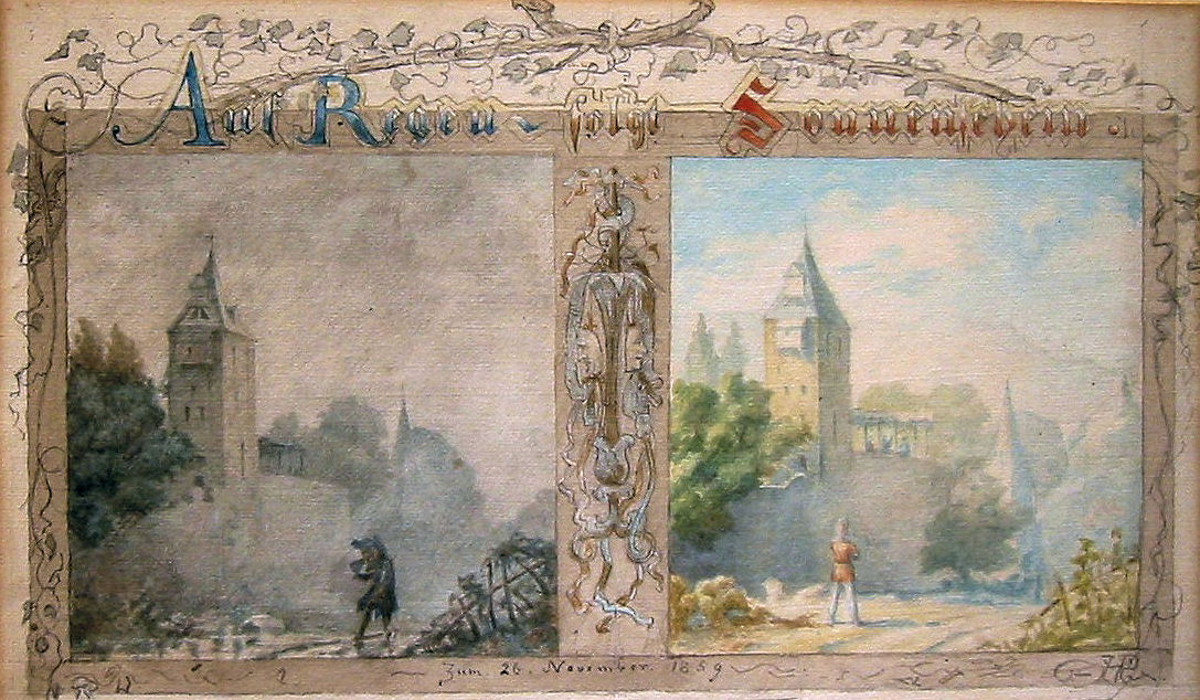 „Auf Regen folgt Sonnenschein“, Aquarell von Heinrich Ludwig Philippi, 1859